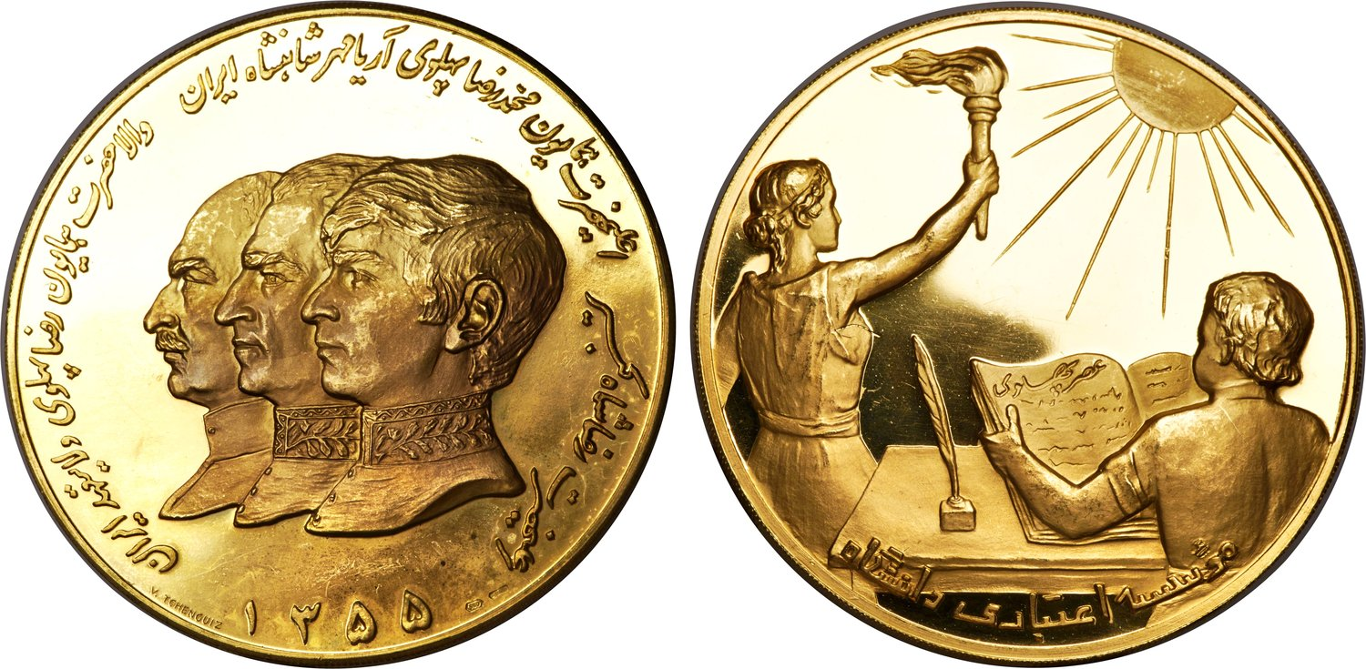 مدال طلای یادبود خاندان پهلوی شامل رضا شاه، محمدرضا شاه و ولیعهد